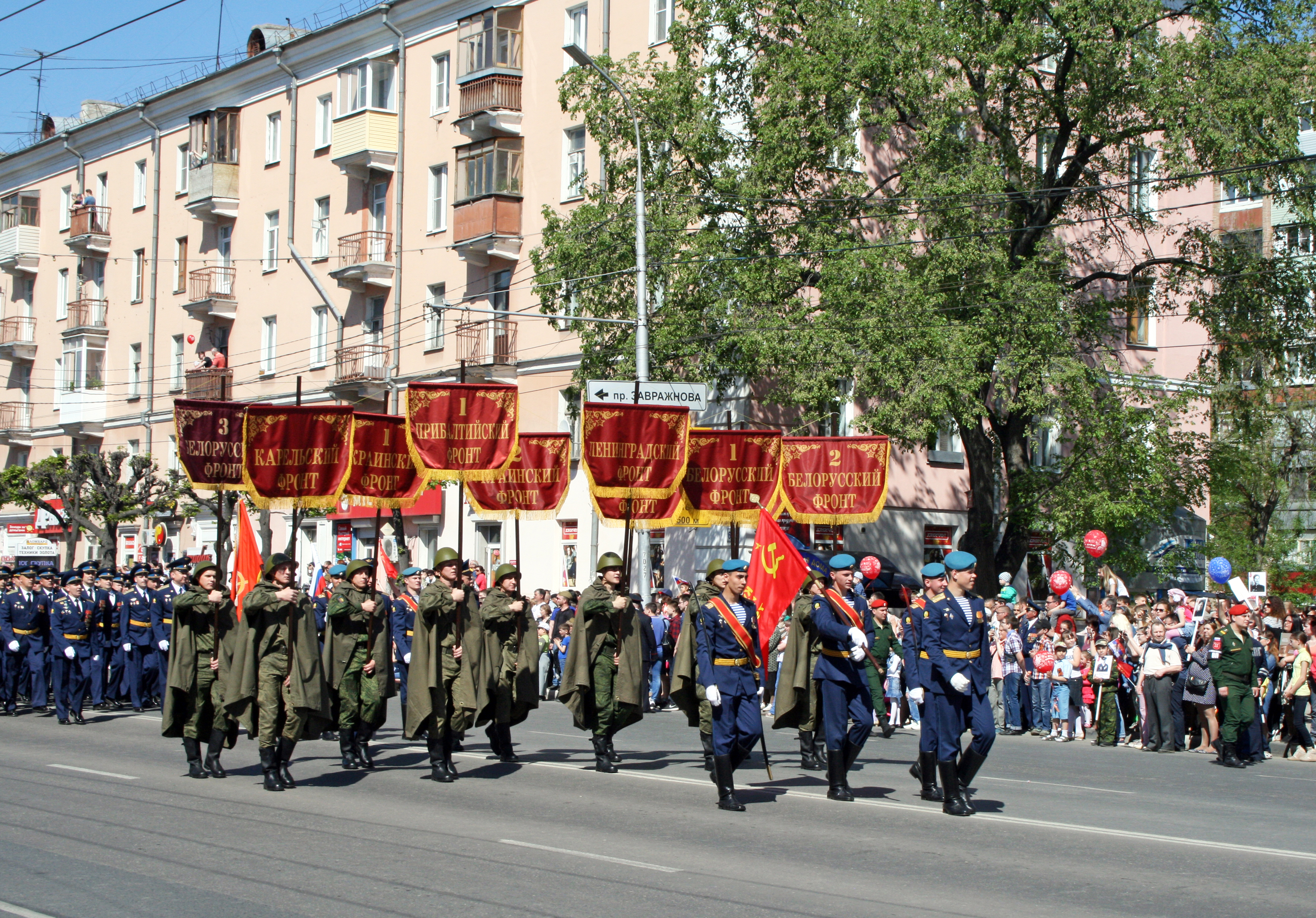 9 мая 2016, Рязань, Первомайский проспект. Колонна военнослужащих на праздновании 71 годовщины Победы в Великой Отечественной войне. Фото Андрея Миронова.